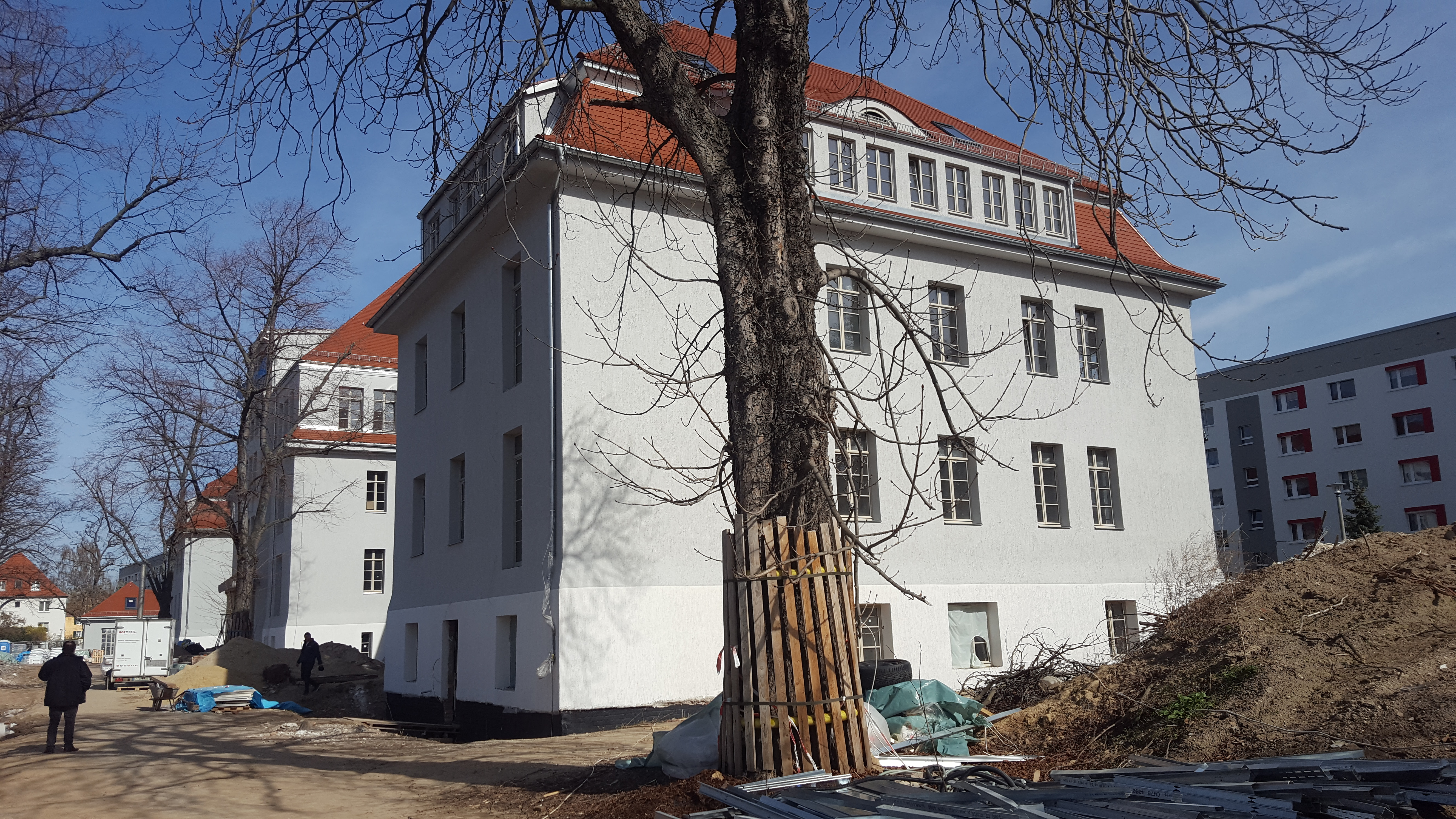 Dresden Kaserne Übigau: An der Washington-/Werft-Klinger- und Scharfenberger Straße. Zur zivilen und militärischen Luftfahrt wurde 1913/1914 in Übigau eine Luftschifferkaserne gebaut. Später waren Nachrichteneinheiten stationiert. Im Mai 1945 besetzte die Roten Armee die unbeschädigte Kaserne und stationierte eine sowjetische Pioniereinheit. Nach deren Abzug im Frühjahr 1993 war die Kaserne stark verwahrlost. Das Areal wurde mit Wohnungen und verschiedenen Einrichtungen bebaut bzw umgebaut. Gebäude an der Klingerstraße